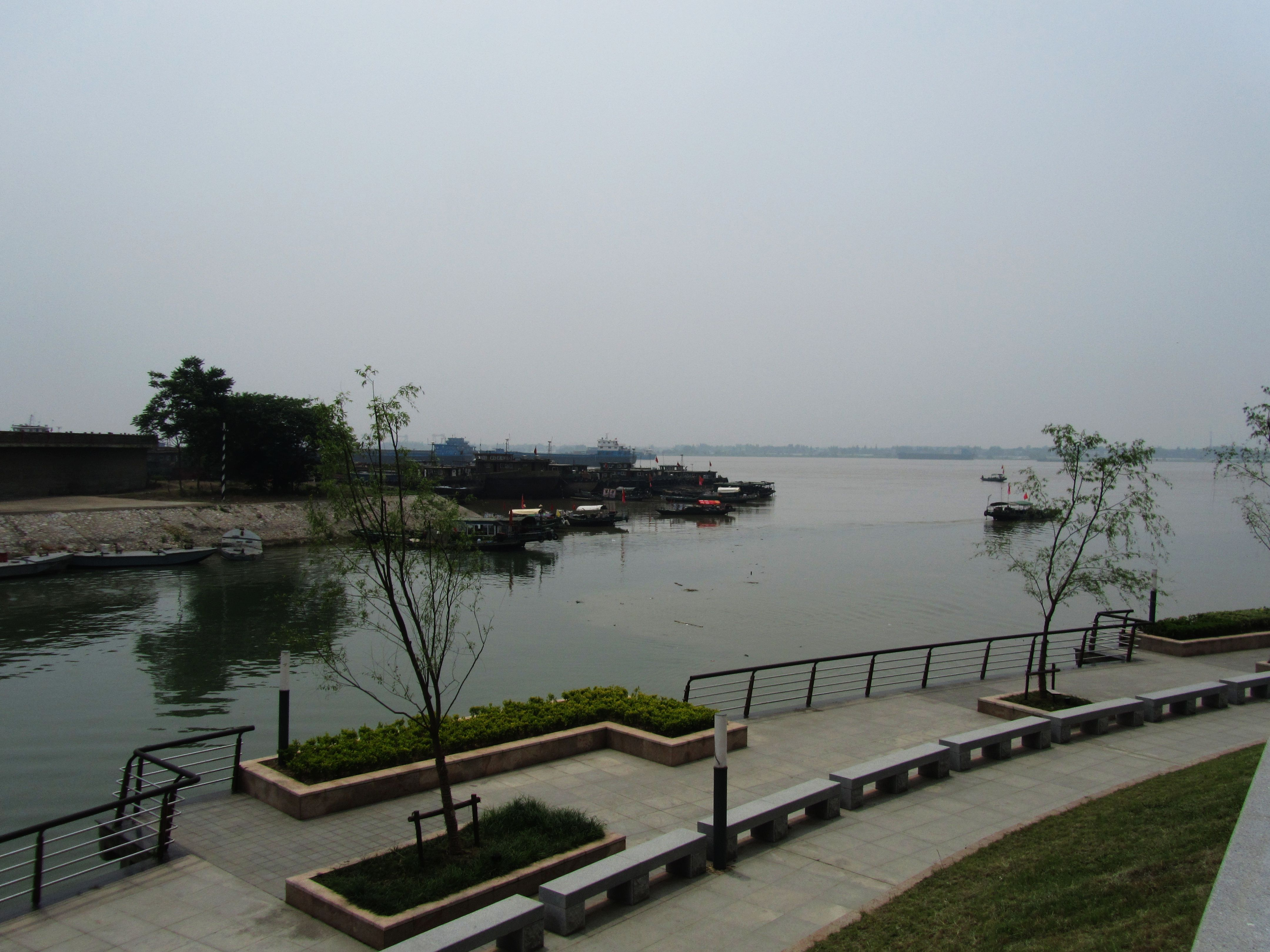 芜湖青弋江与长江交汇处。